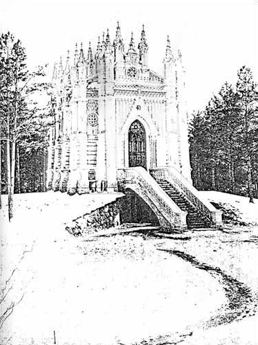 Беларуская (тарашкевіца): Быкаўшчына (Bykaŭščyna). Касьцёл